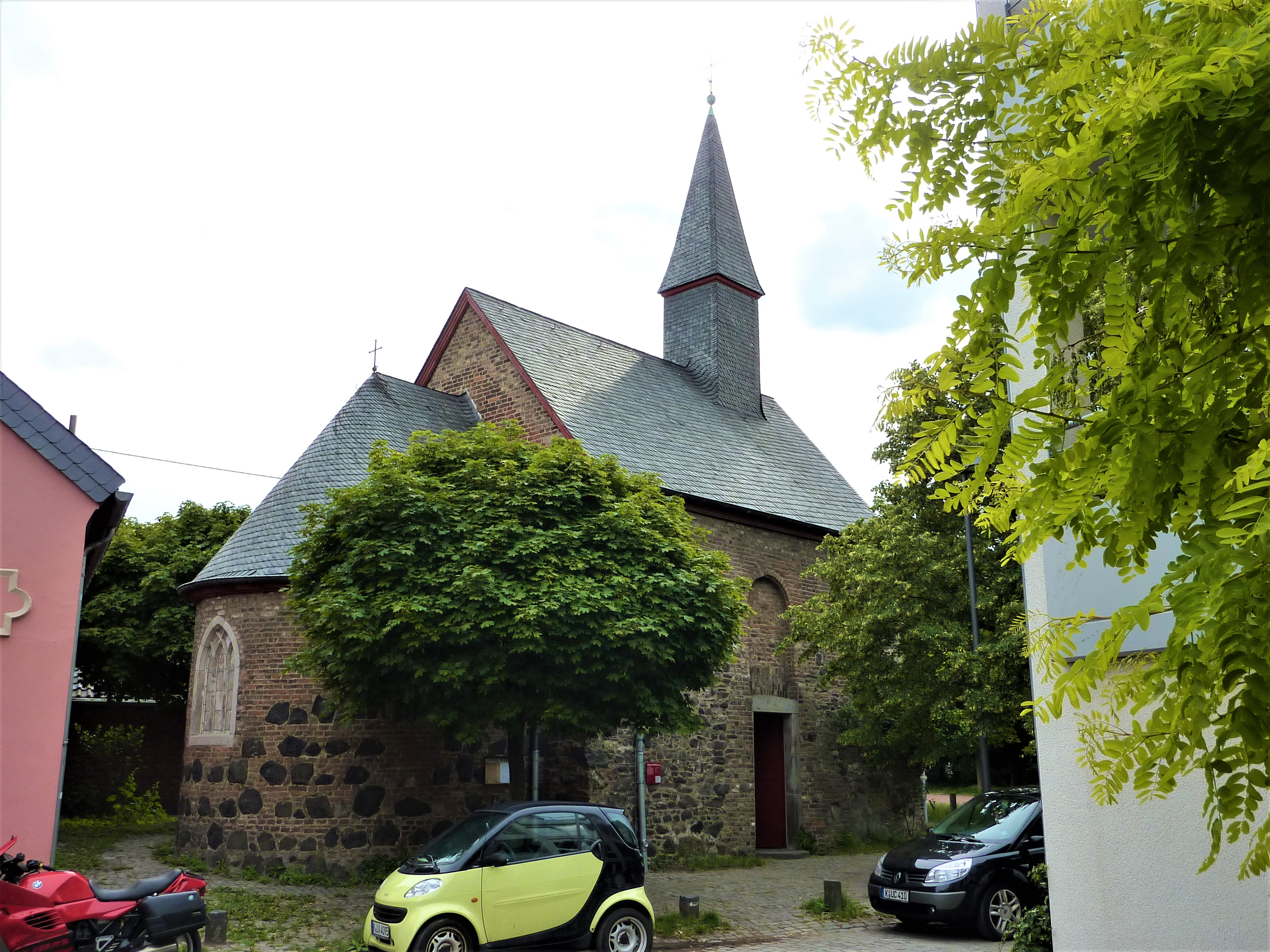 St. Georgskapelle (Köln-Weiß)